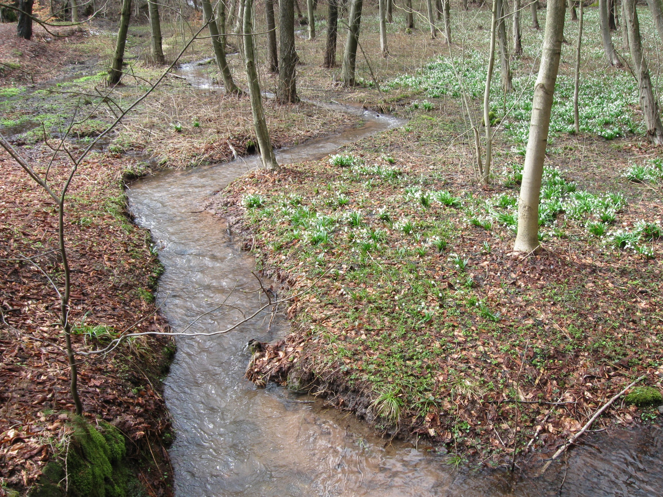 Materník ještě před soutokem se Zbečnickým potokem